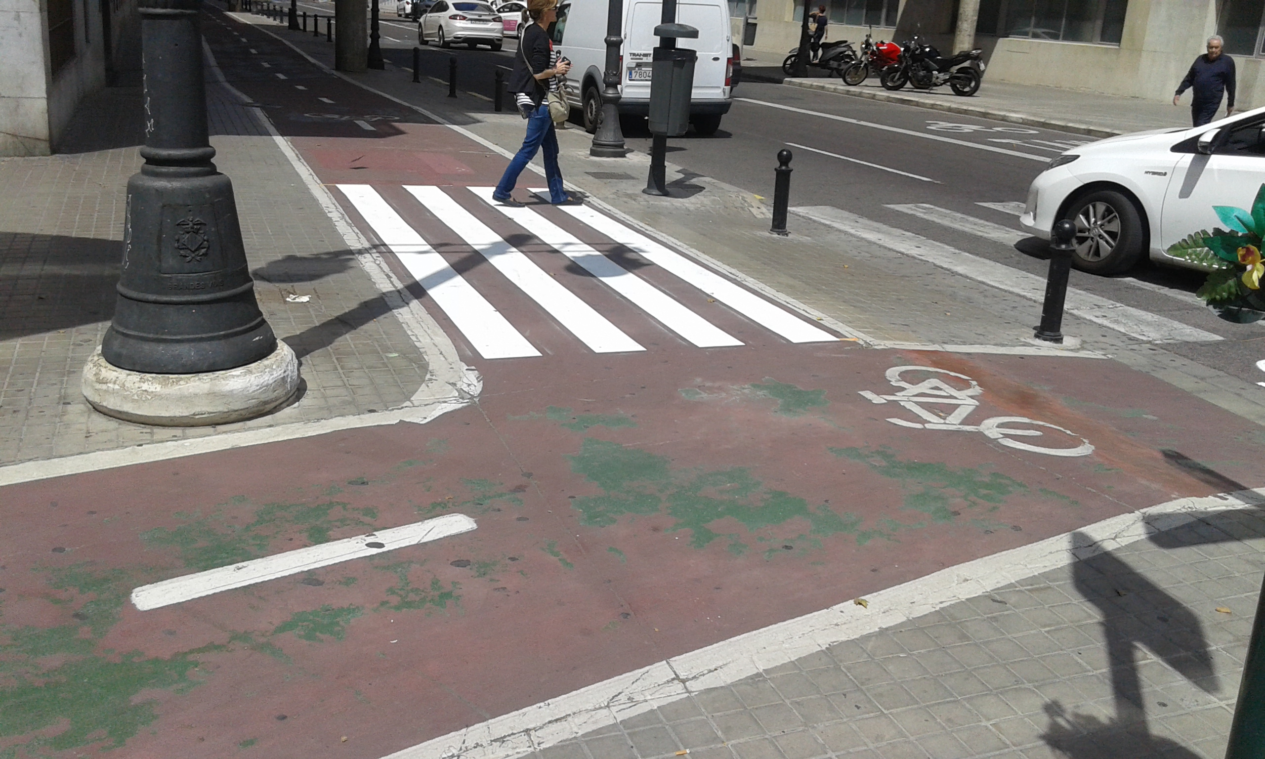 Pas de vianants sobre carril bici a València